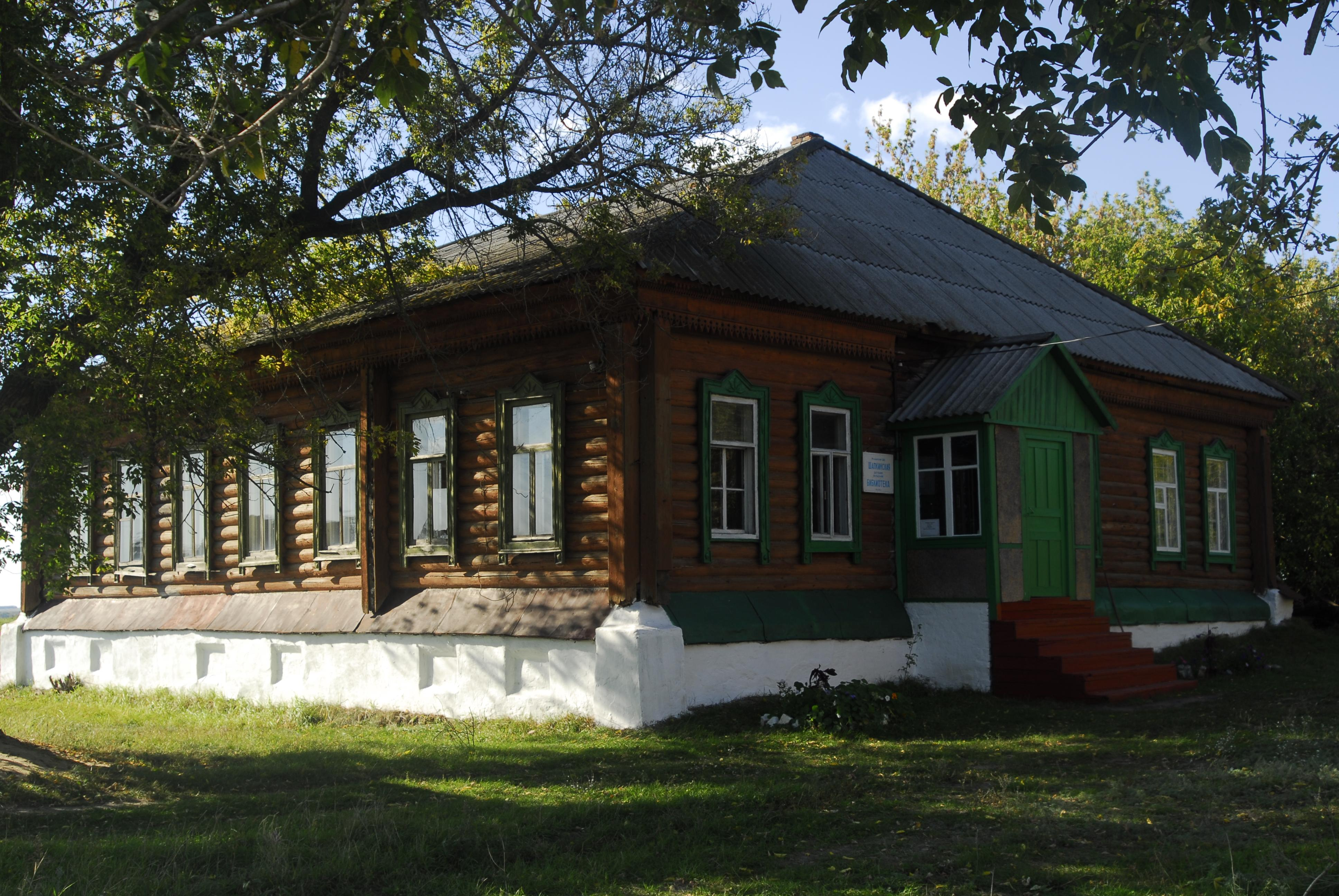 Село Шапкино (Тамбовская область). Казачий центр - музей "Истоки" - до революции - здание Шапкинского волостного правления.